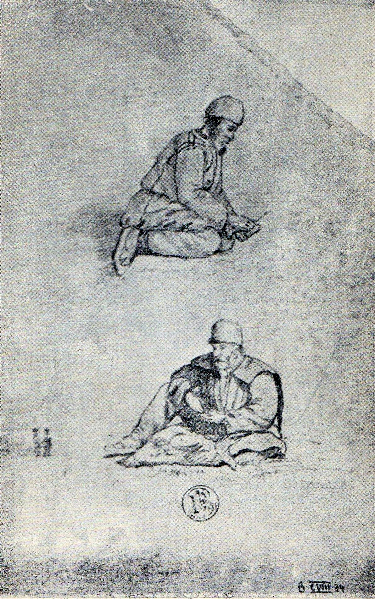 Batrani in repaos